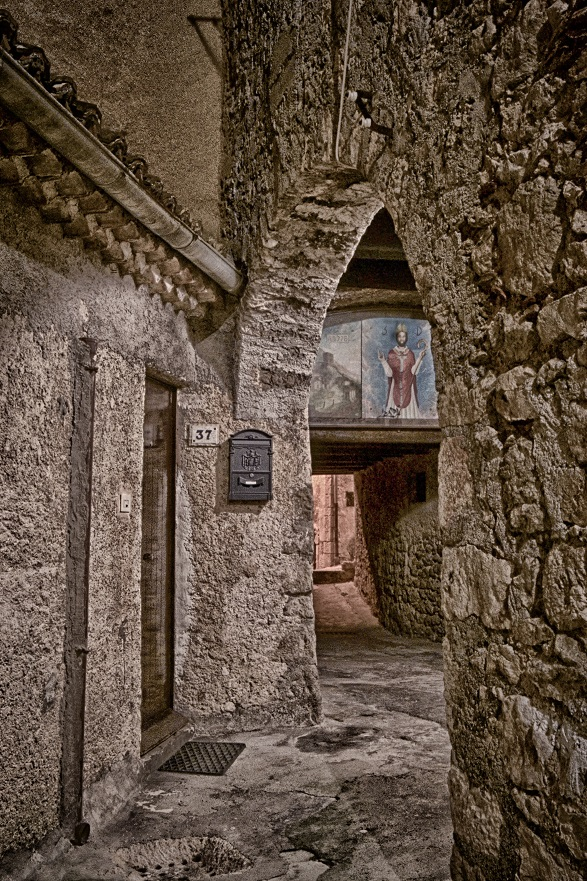 Spuort' delle origini